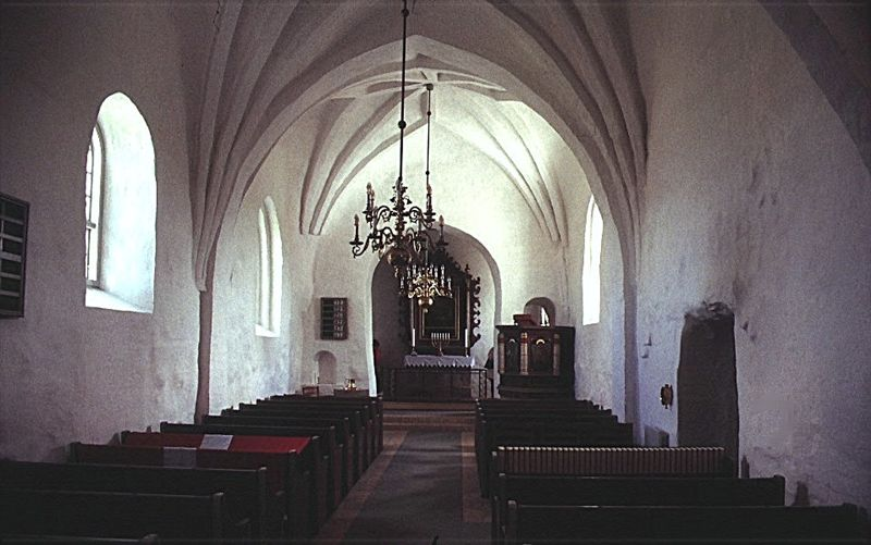 Alstrup Kirke i Danmark. Skibet set mod øst